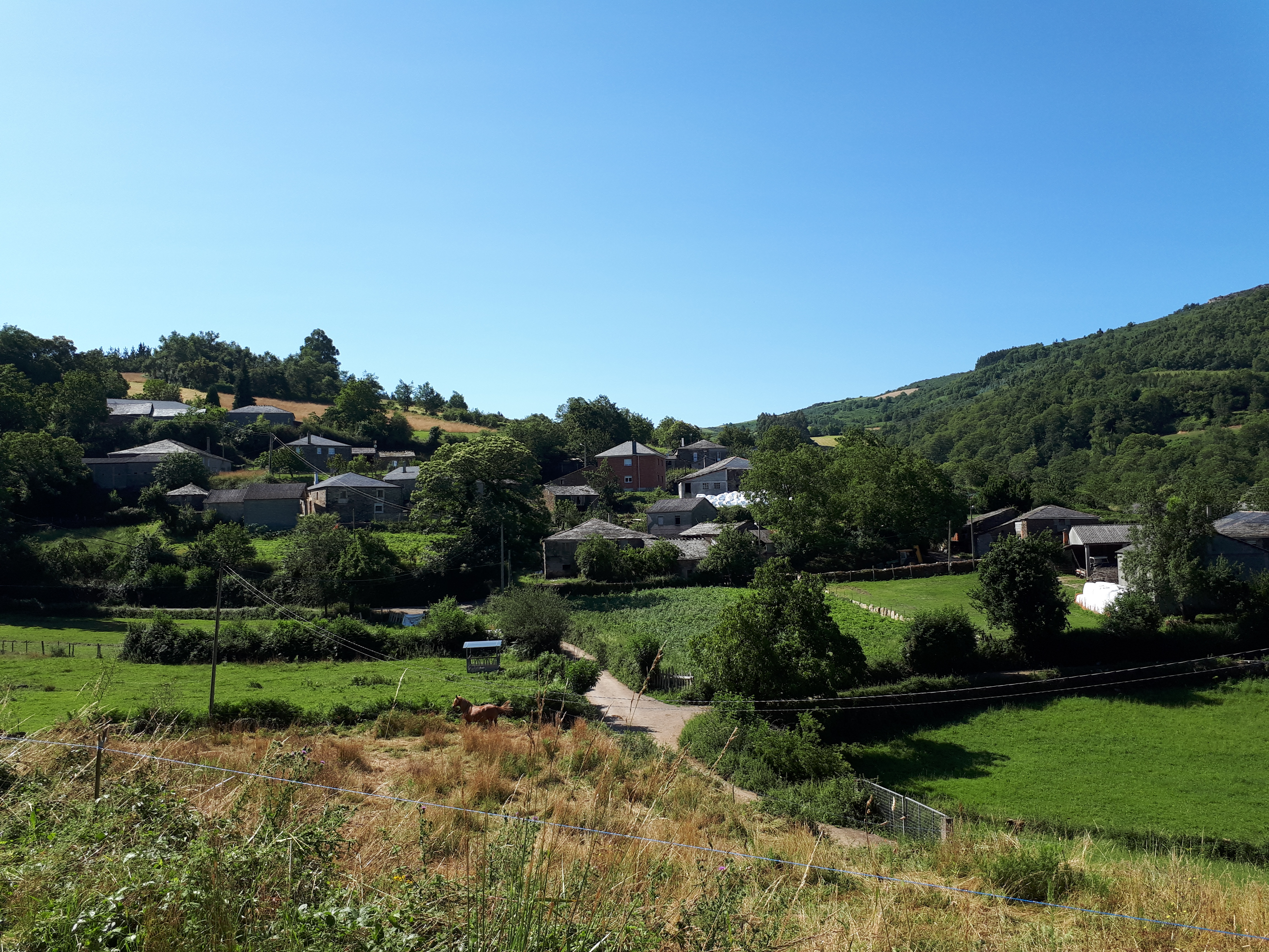 San Xurxo de Vale